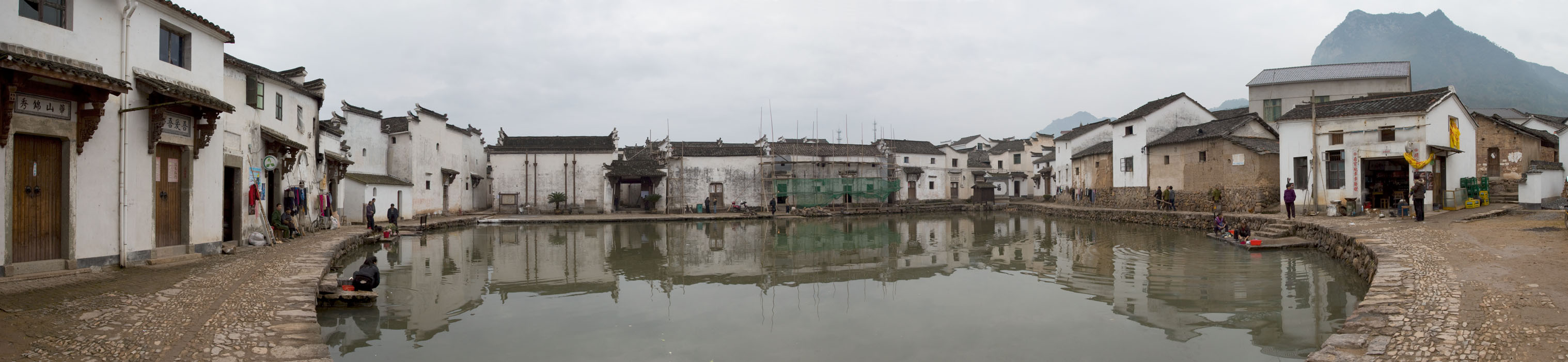 浙江省建德市新叶村南塘